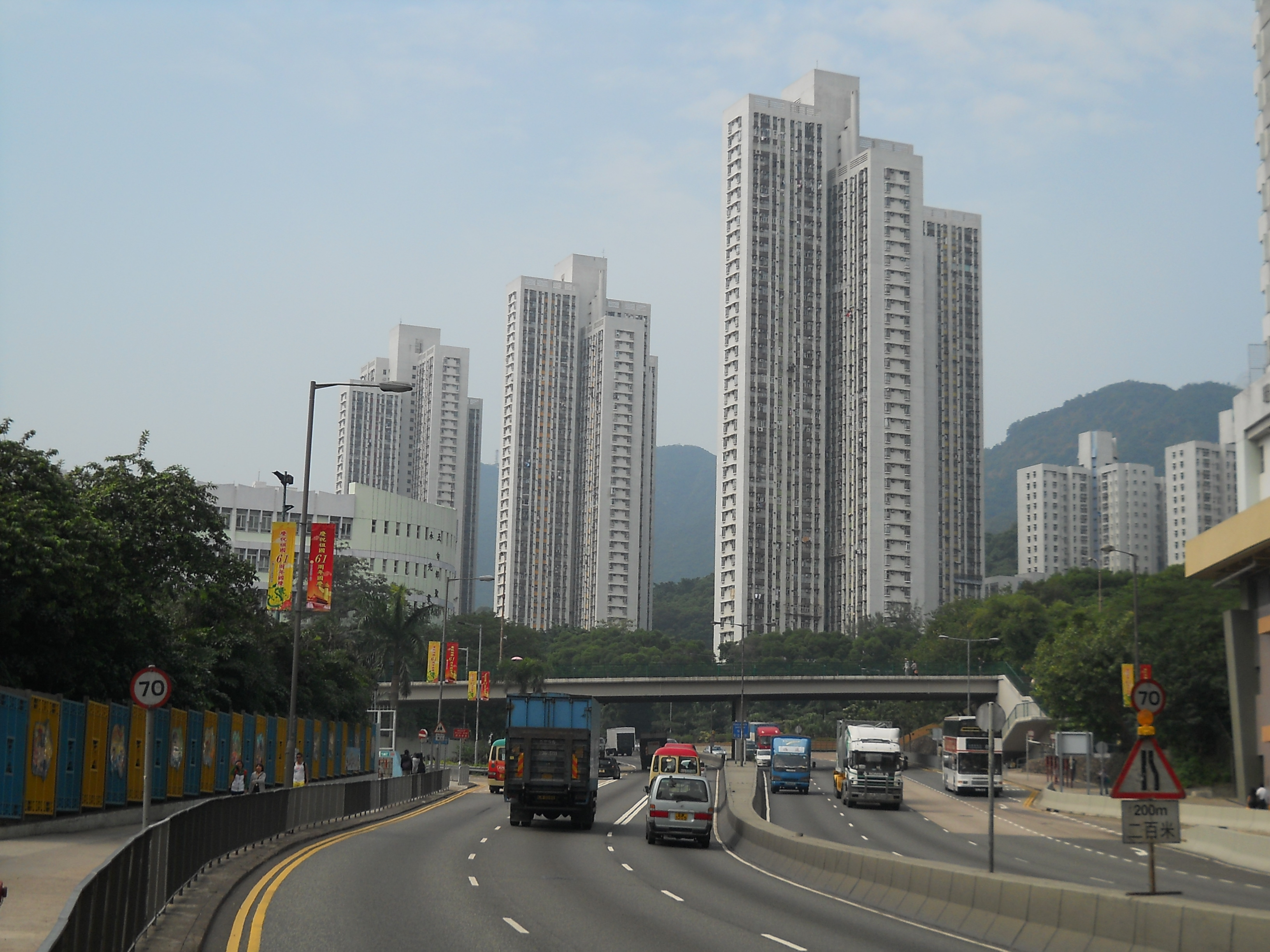 中文（香港）: 天馬苑